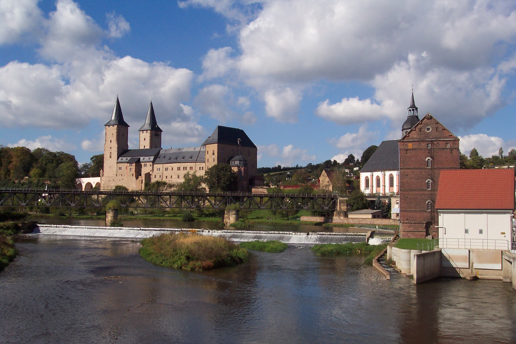 Schloss Rochlitz